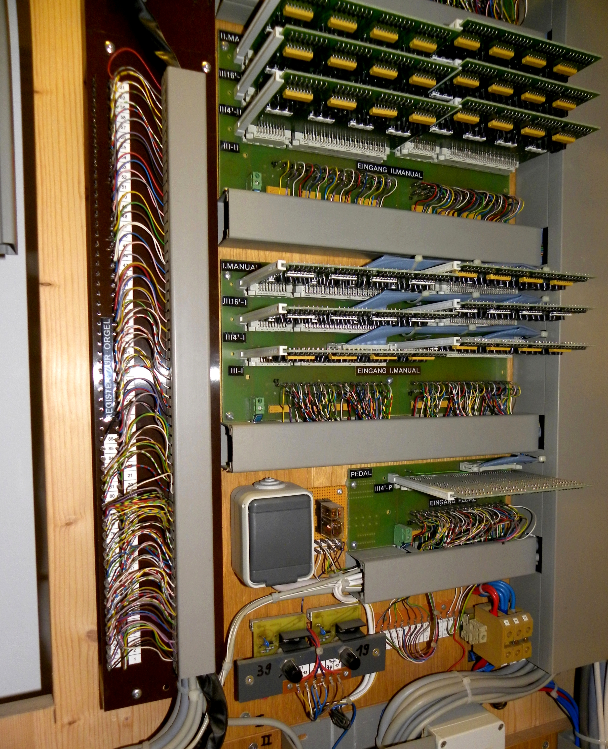 Elektronika w nowoczesnych organach piszczałkowych